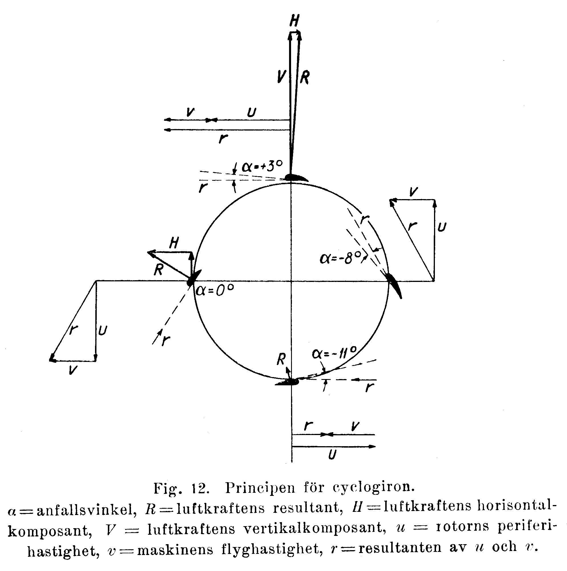 Схема работы цикложира